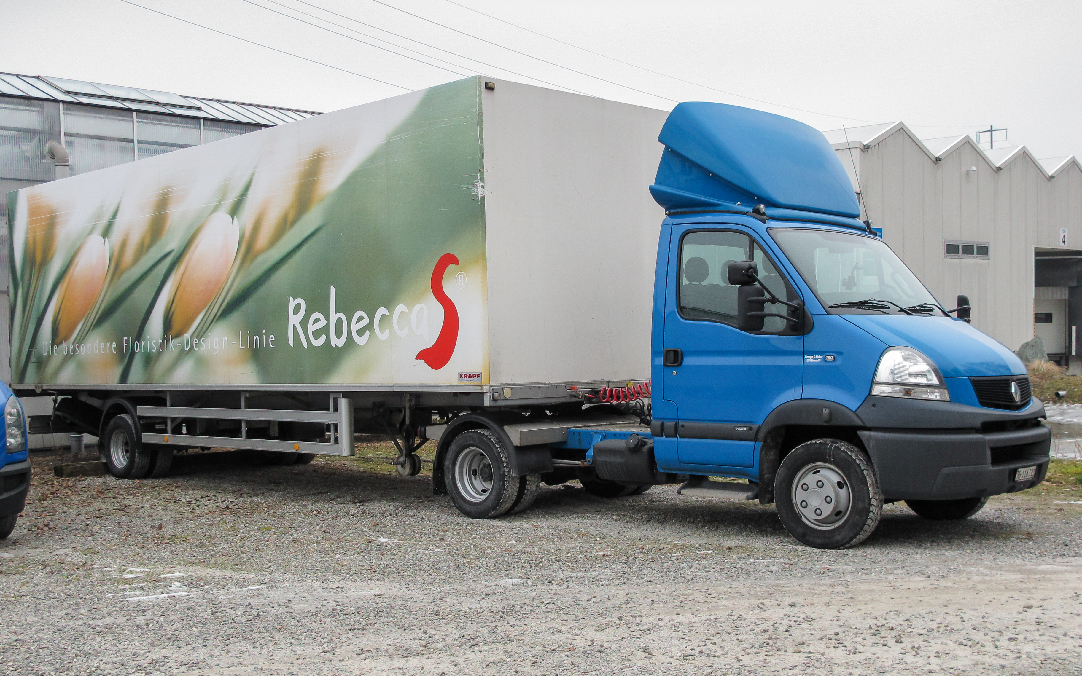 Renault Mascott 160 DXi Sattelzug